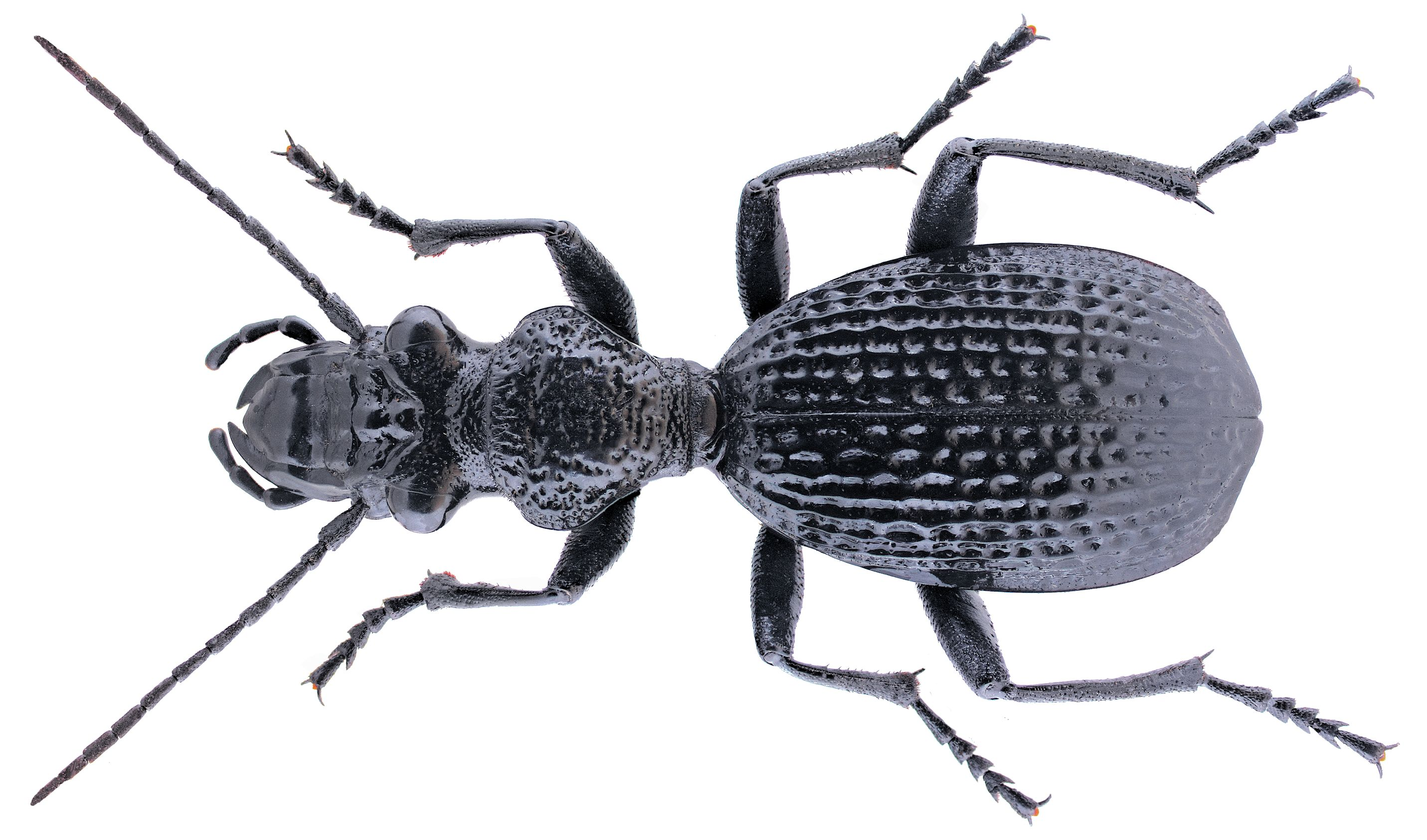 Familie: Carabidae Grösse: 30-36 mm Fundort: Kenia, Tsavo National Park leg. U.Schmidt, 1991; det. W.Lorenz Foto: U.Schmidt, 2007